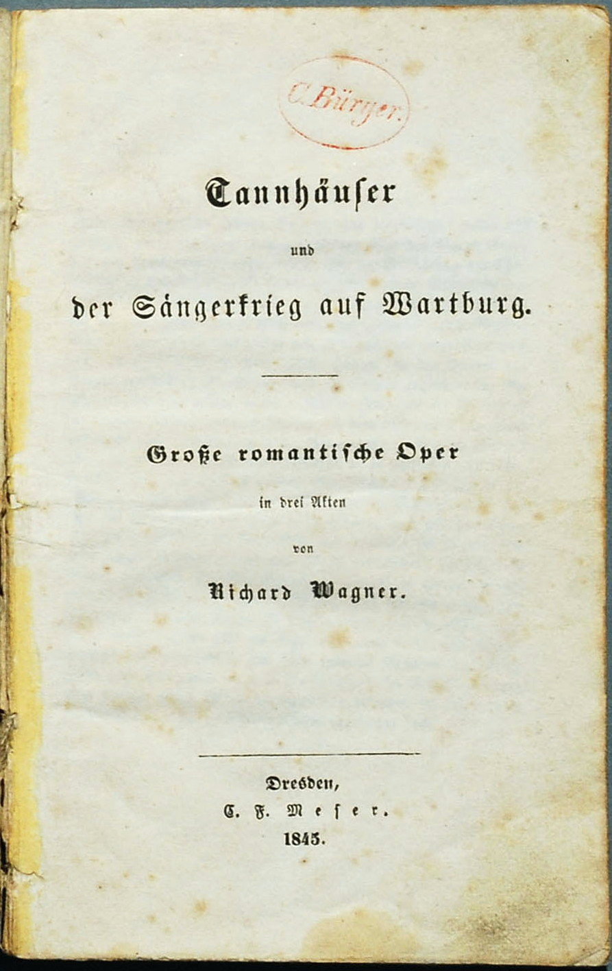 Wagner, Richard: Tannhäuser und der Sängerkrieg auf Wartburg. Große romantische Oper in drei Akten. Dresden, C. F. Meser 1845.